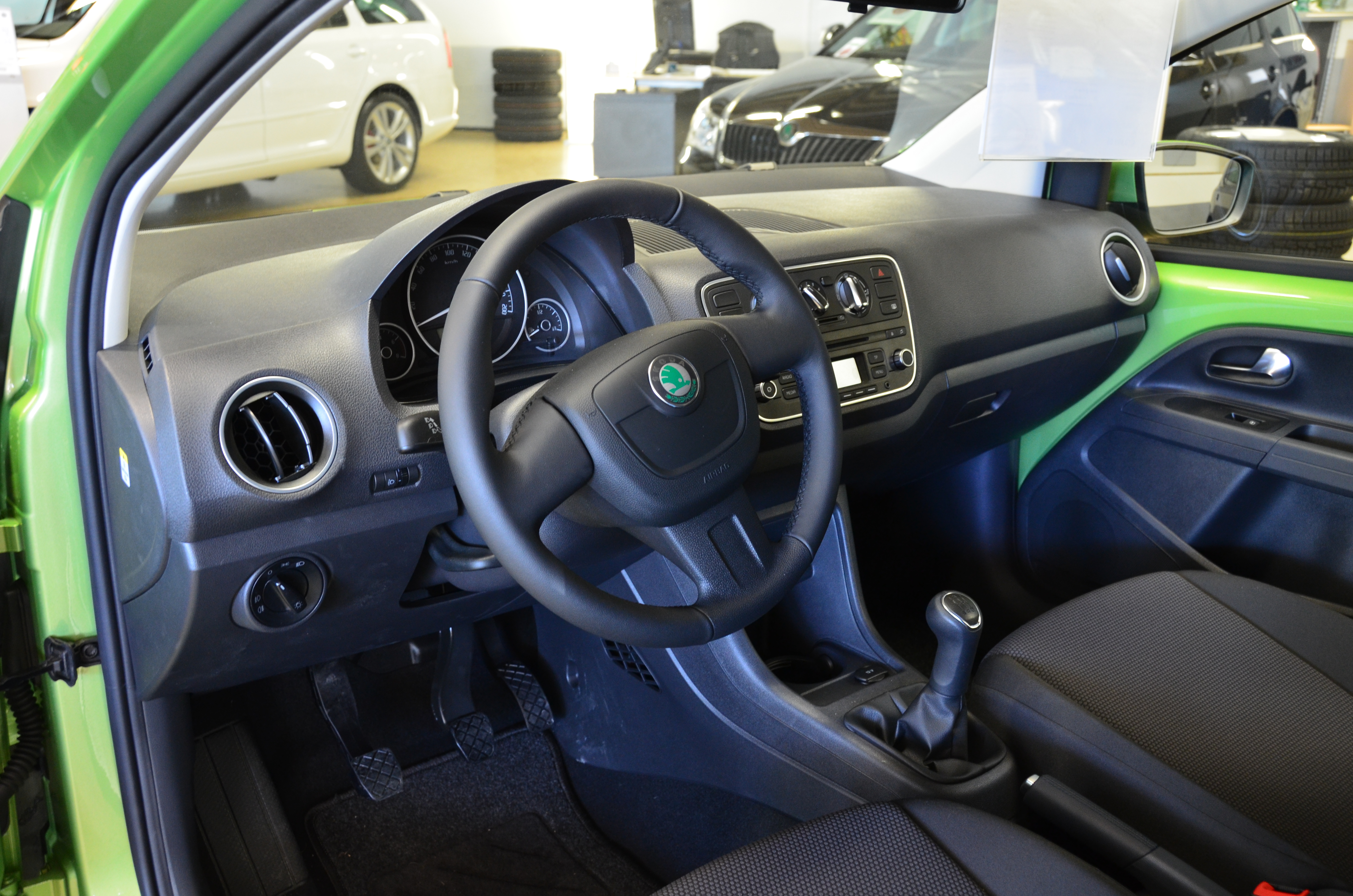 Škoda Citigo, 1.0 Liter. Dreitürer.